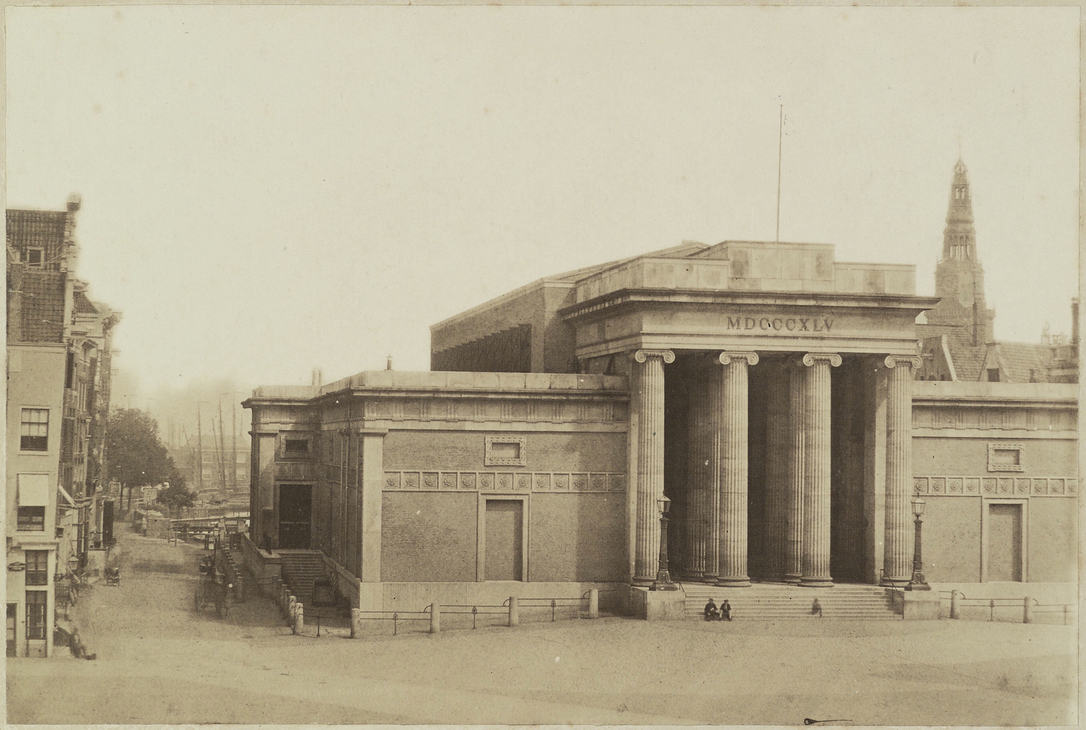 Beurs: Overzicht voorgevel beursgebouw (opmerking: Bijschrift: La Bourse de Commerce. (Dam.) Amsterdam. - Johannes Leeuwenkuijl.)